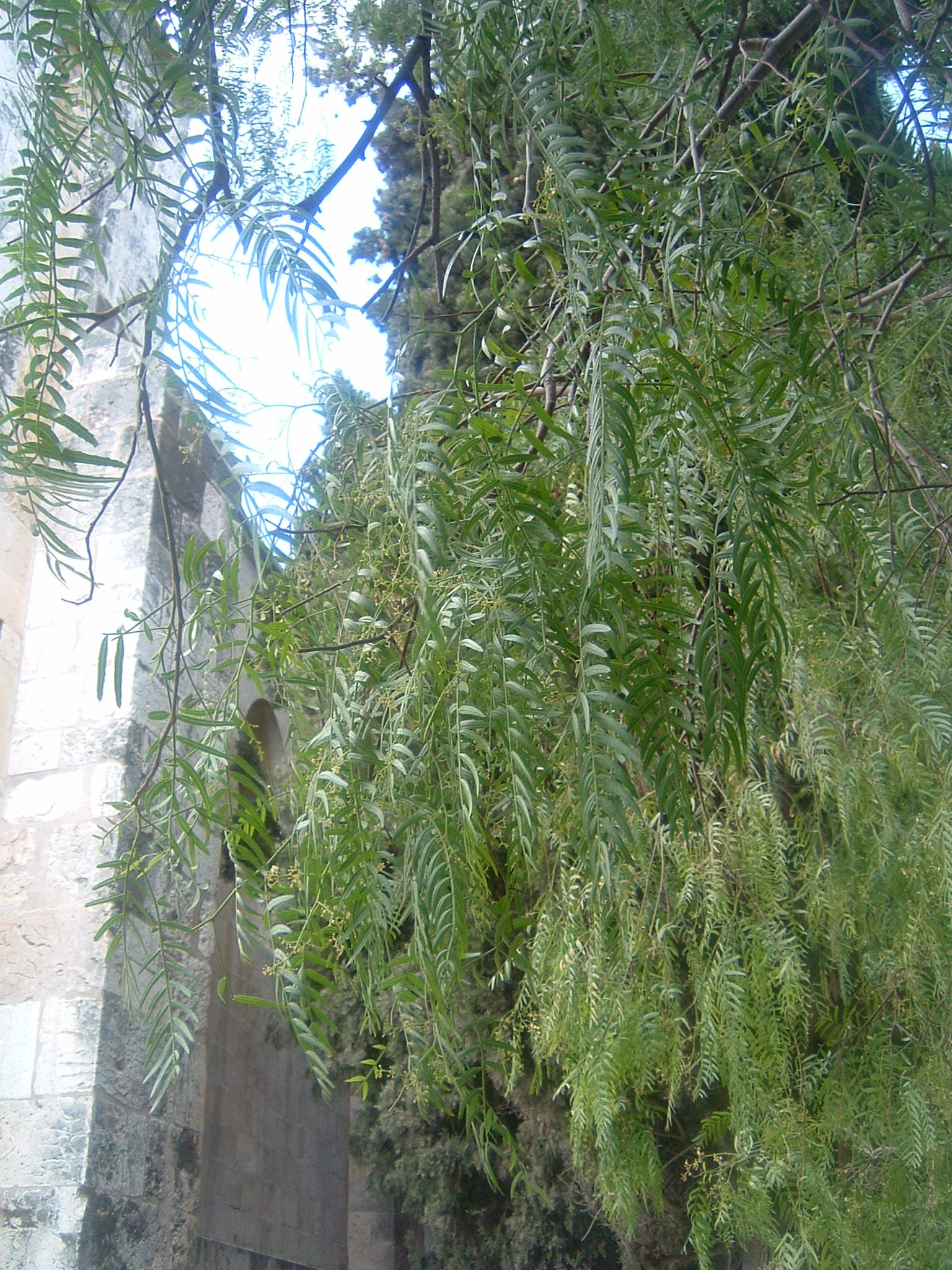 Foglie dell'albero del pepe del monastero etiope di Gerusalemme Foto scattata da me l'11 giugno 2008